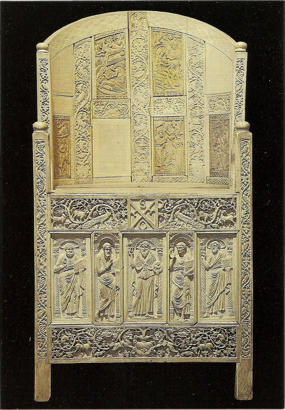 catedra